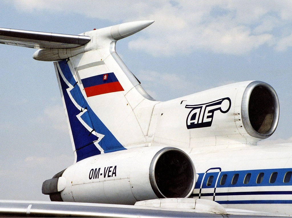 Air Transport Europe Tupolev Tu-154M